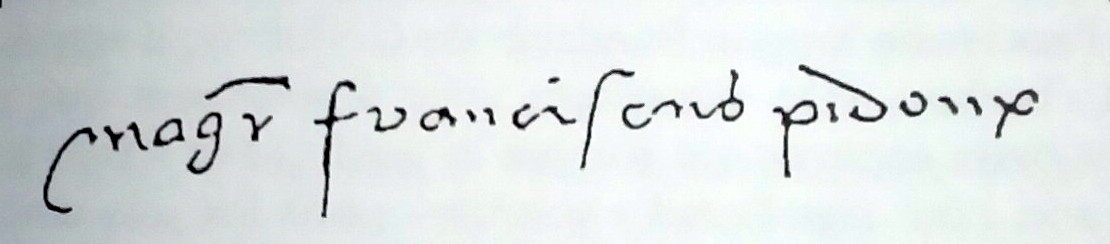 Magister Franciscus Pidoux, signature sur le brevet d'agrégation de médecine, daté du 31 janvier 1541 (archives de la famille Pidoux de la Maduère)